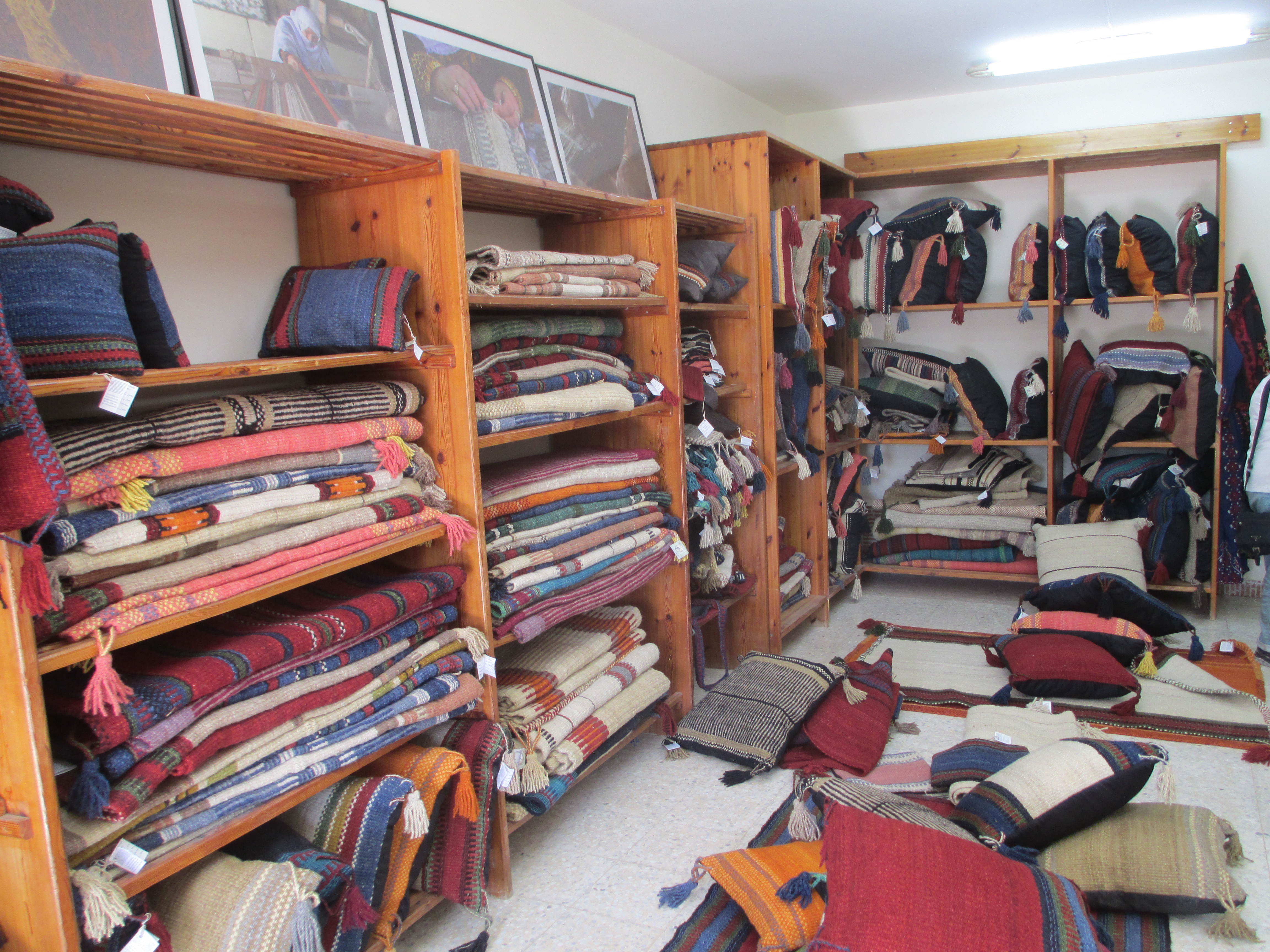 מפעל האריגה בלקיה